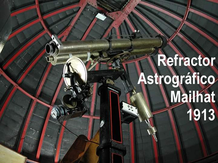 Refractor Astrográfico Mailhat 1913